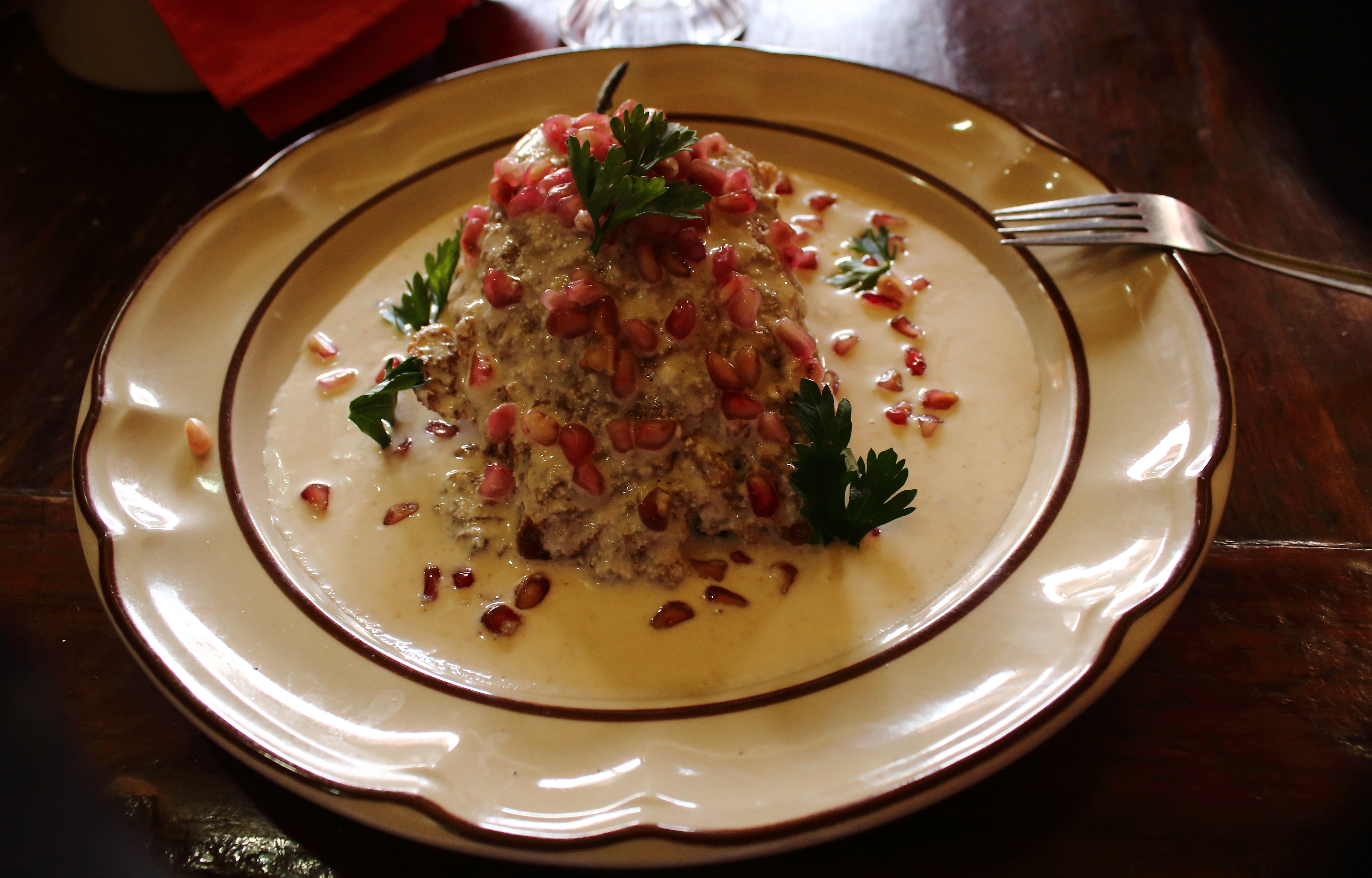 Platillo típico de Puebla, chile en nogada.